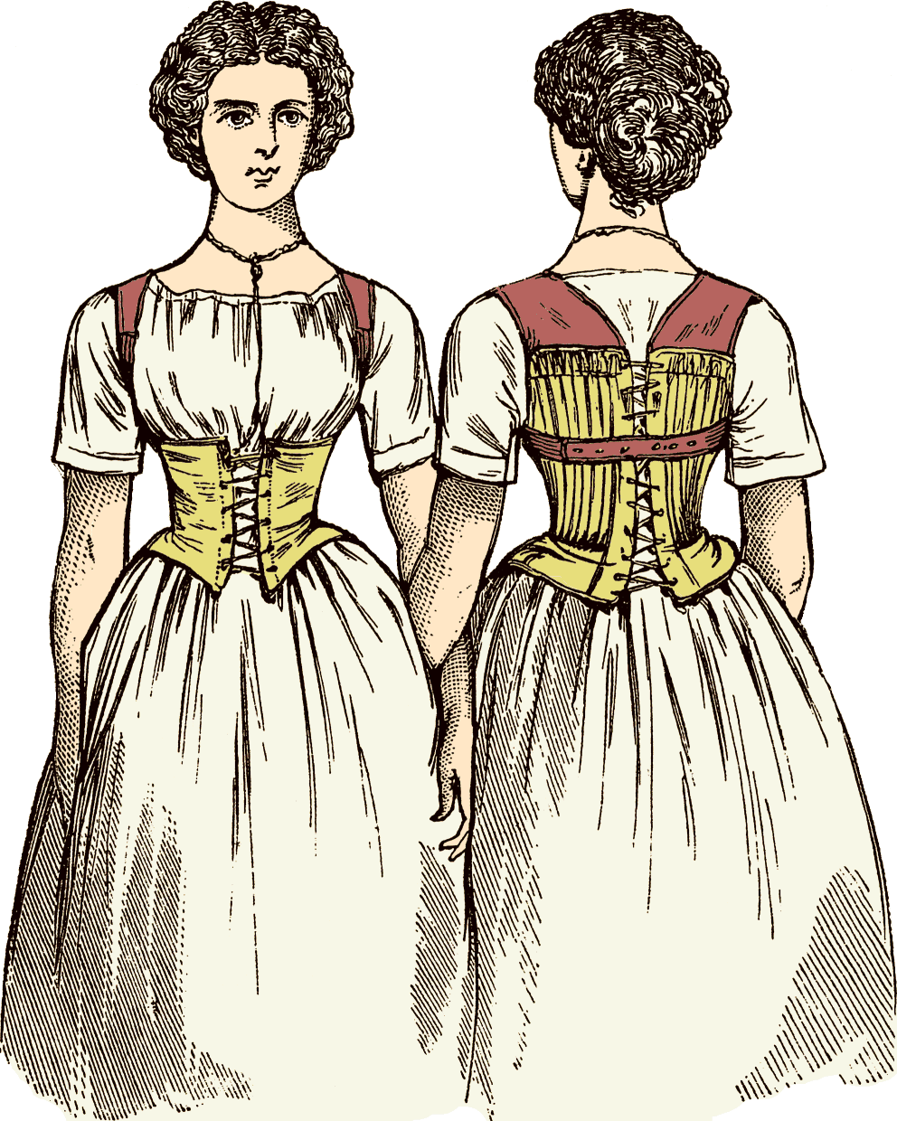 piger med korset og skulderstropper